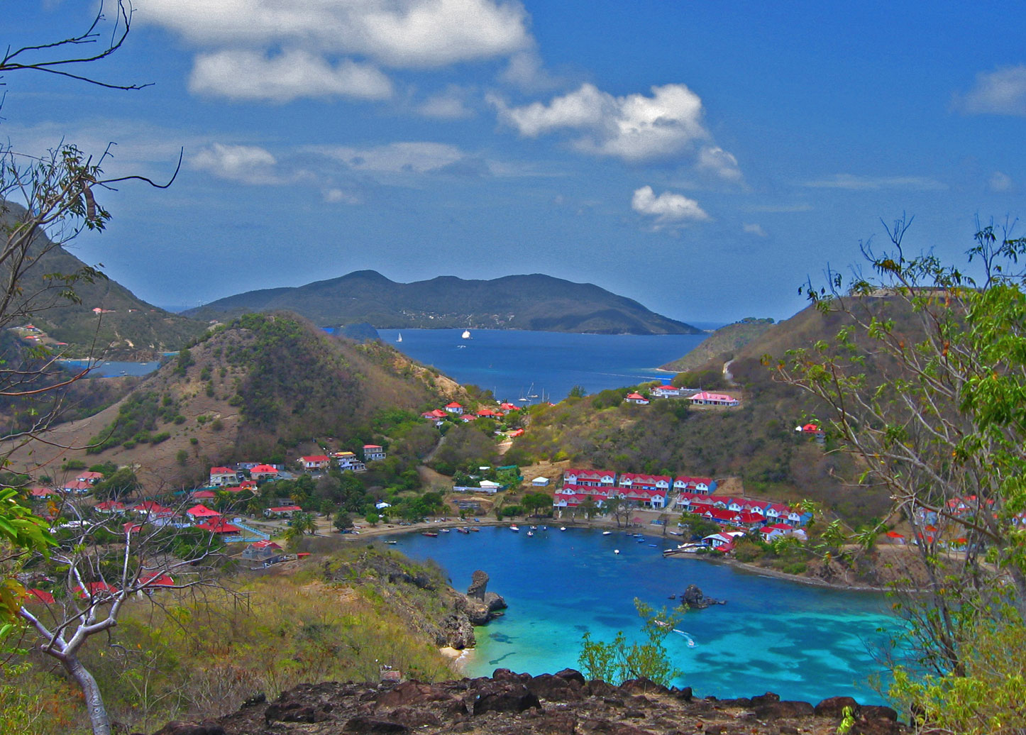 Alignement de l'anse du Marigot, de la baie des Saintes et de Terre de Bas.